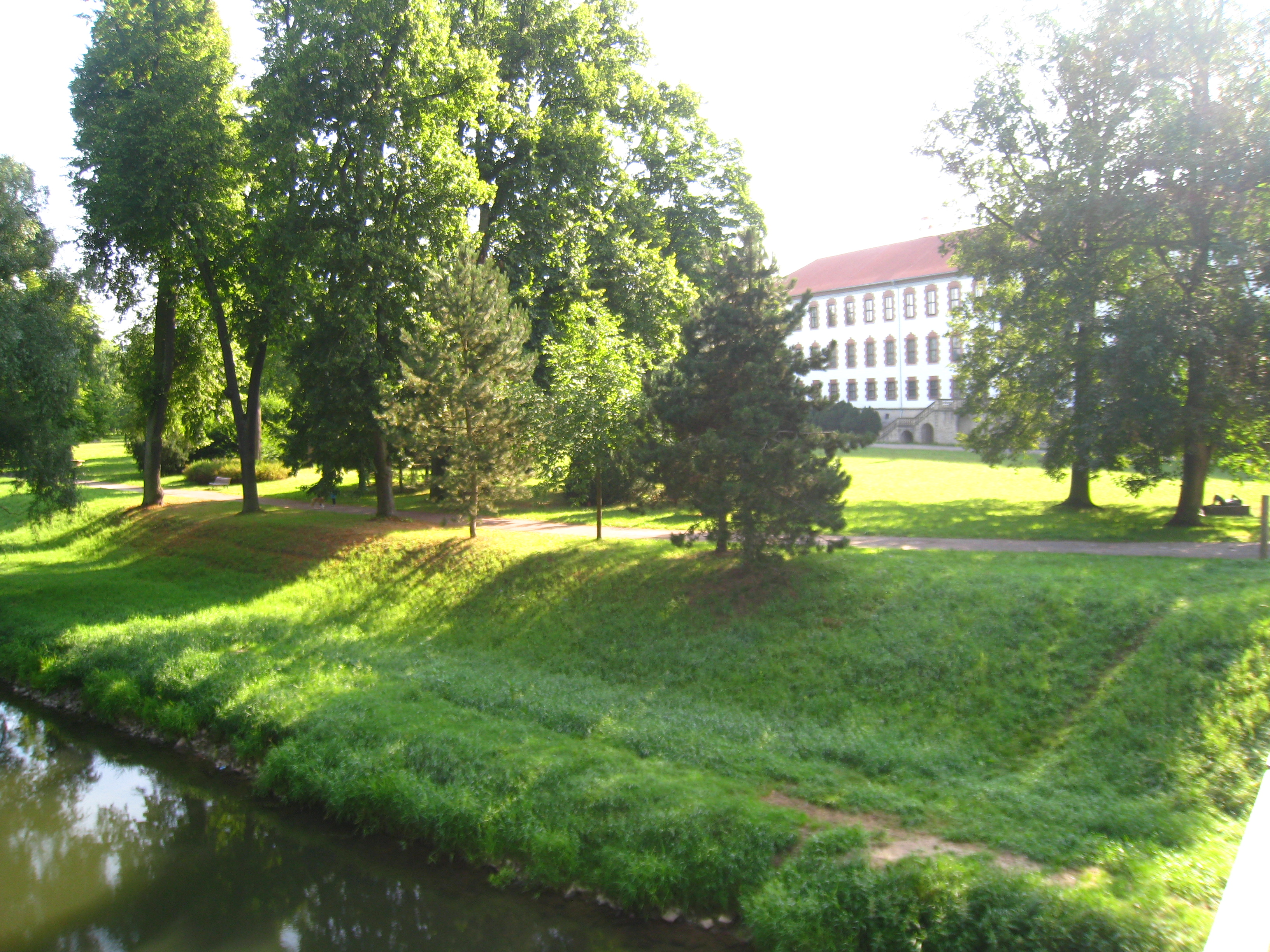 Widok na ścieżkę rowerowa doliny Werry w Meiningen, w pobliżu zamku Elżbiety